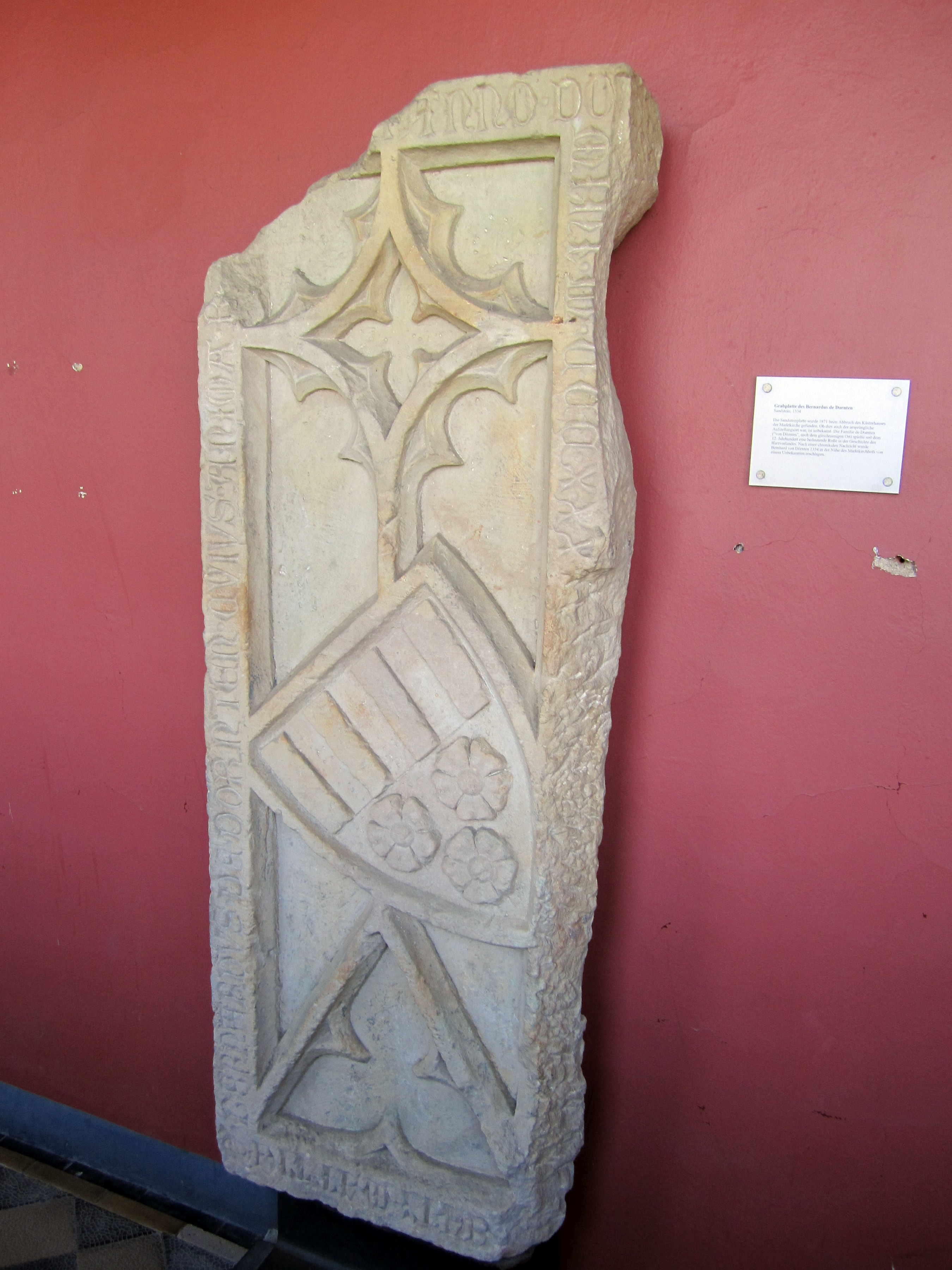 Epitaph des Bernhard von Dörnten ("Bernardus de Dornten"). Kaiserpfalz Goslar, Deutschland.